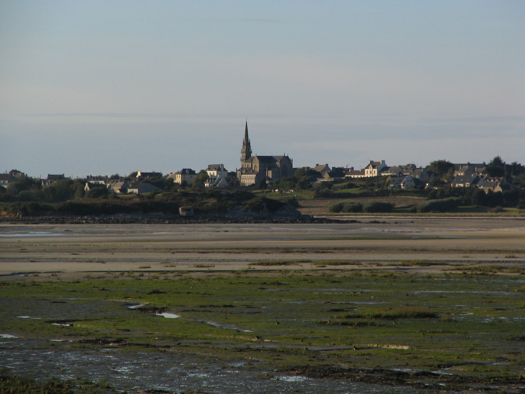 Baie de Goulven